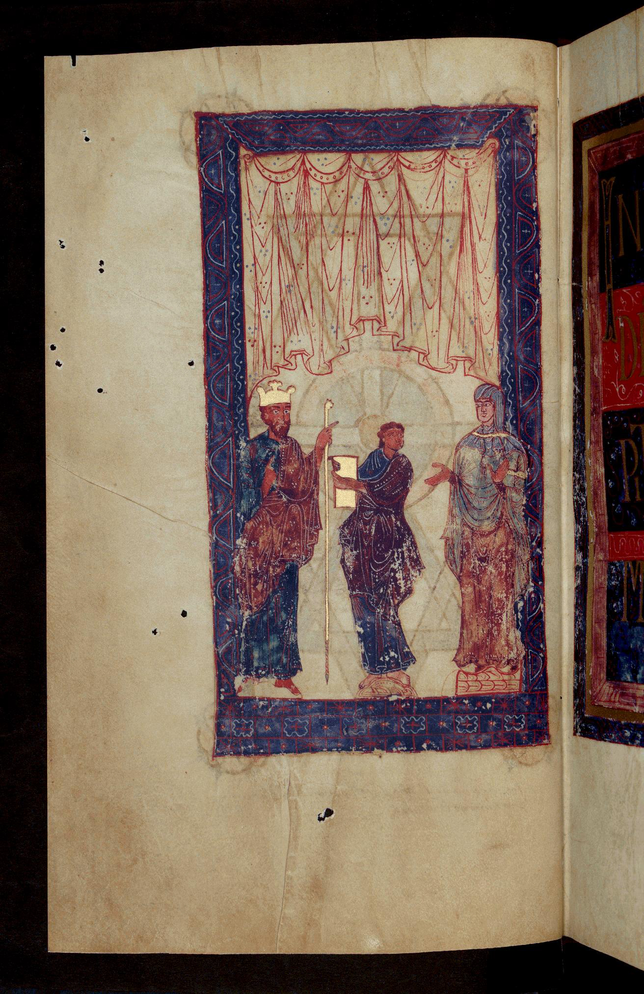 Sancha I e o seu consorte Fernando I, reis de Galiza (1037-1065), reciben o libro.